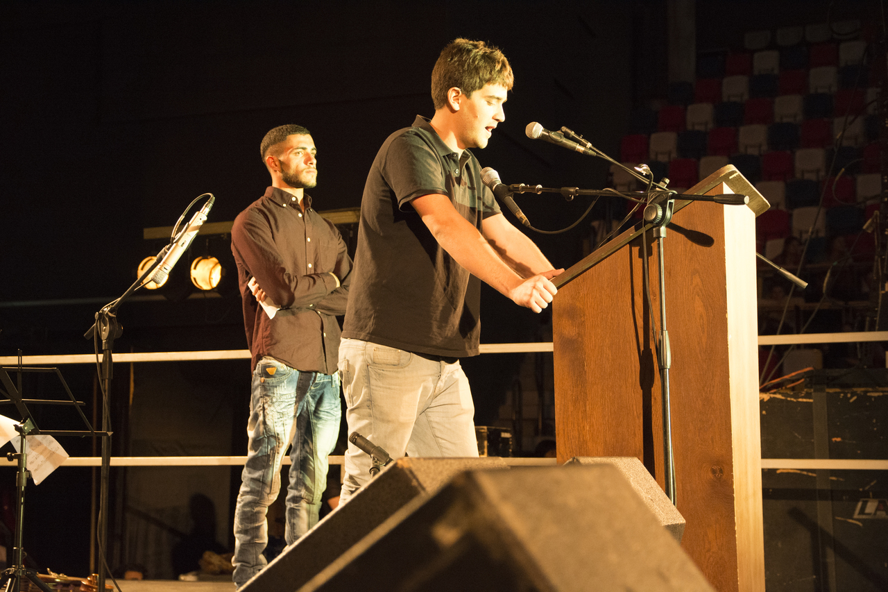 יגאל אלחנן ועראב עראמין, ששכלו את אחיותיהם סמדר (בת 14 במותה) ועביר (בת 10 במותה), בנאומם בטקס בשנת 2016